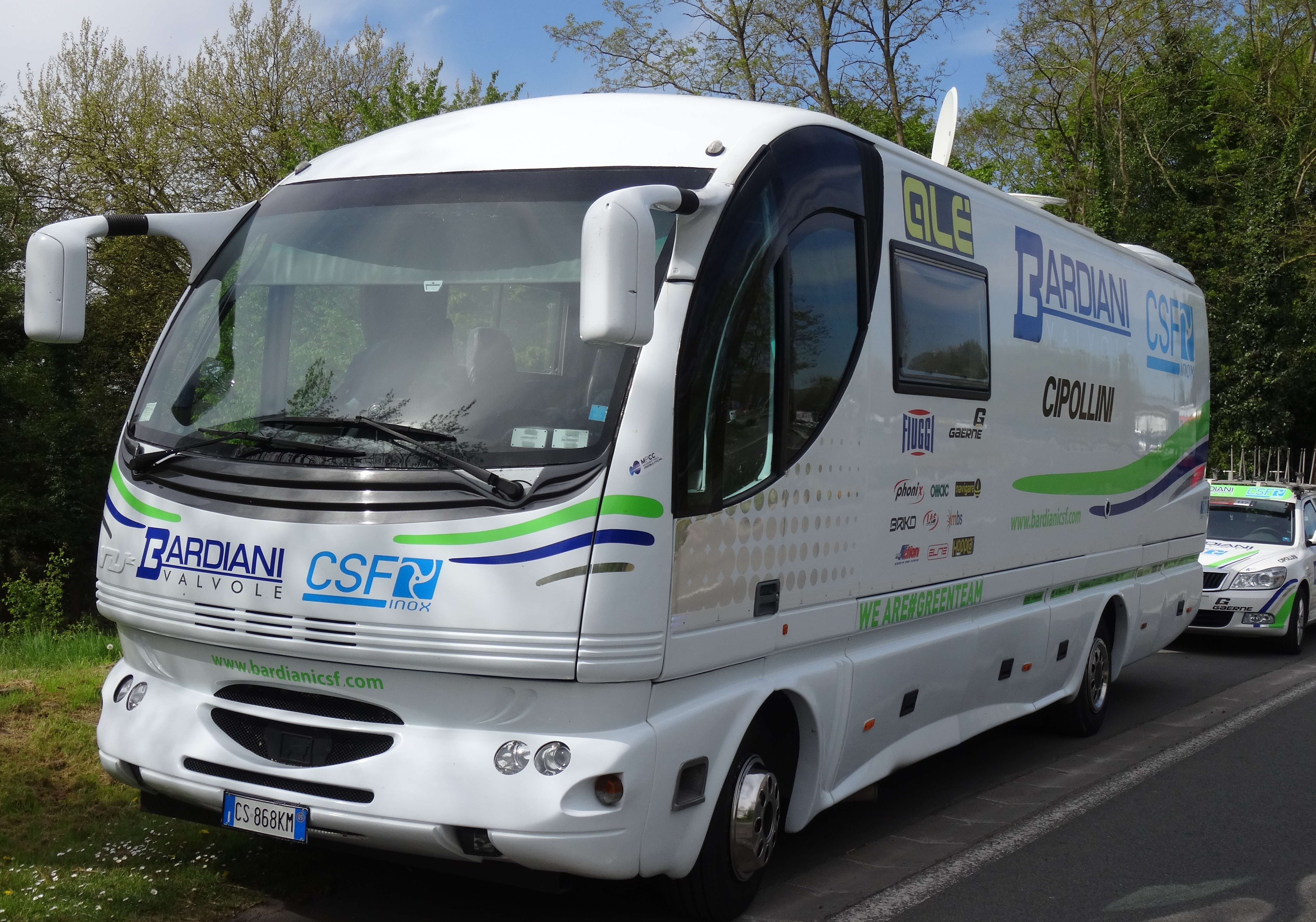 Reportage réalisé le jeudi 17 avril à l'occasion du départ et de l'arrivée du Grand Prix de Denain 2014 à Denain, Nord, Nord-Pas-de-Calais, France.